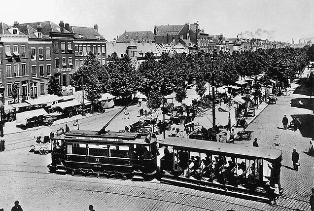 Markt aan de Goudsesingel (Rotterdam) in nl:1918, fotograaf onbekend